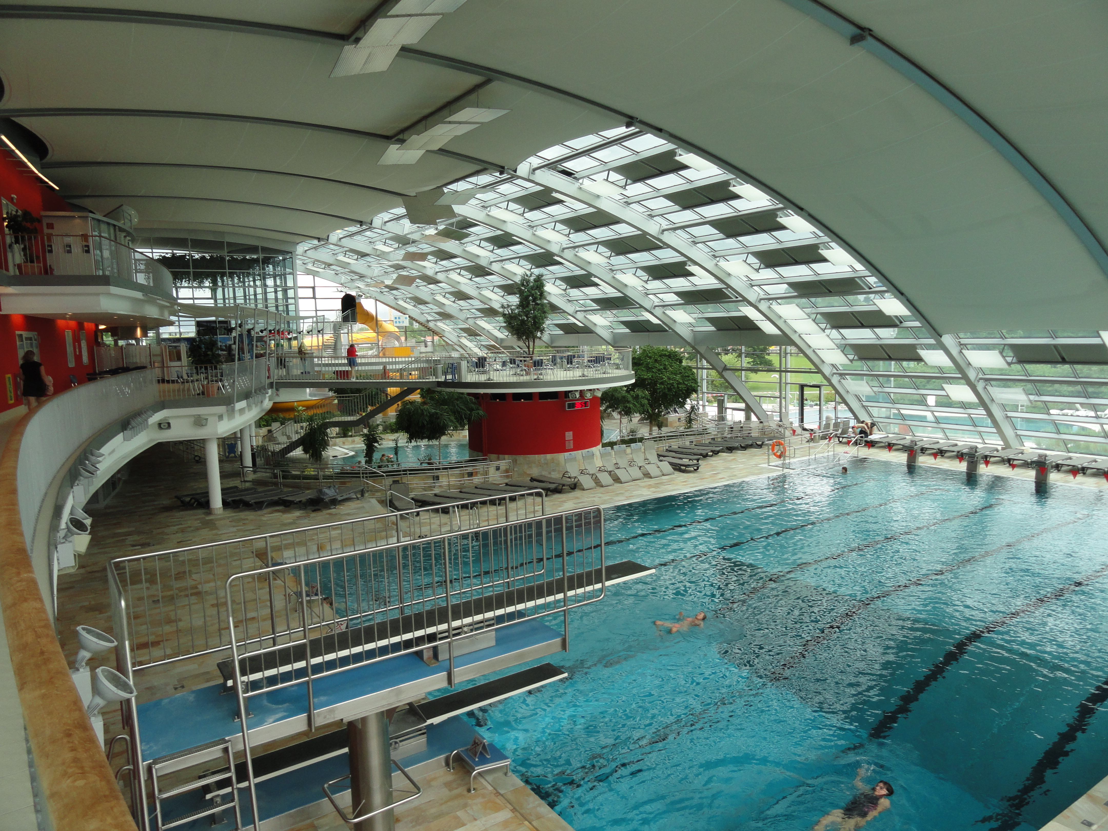 Cambomare, Kempten